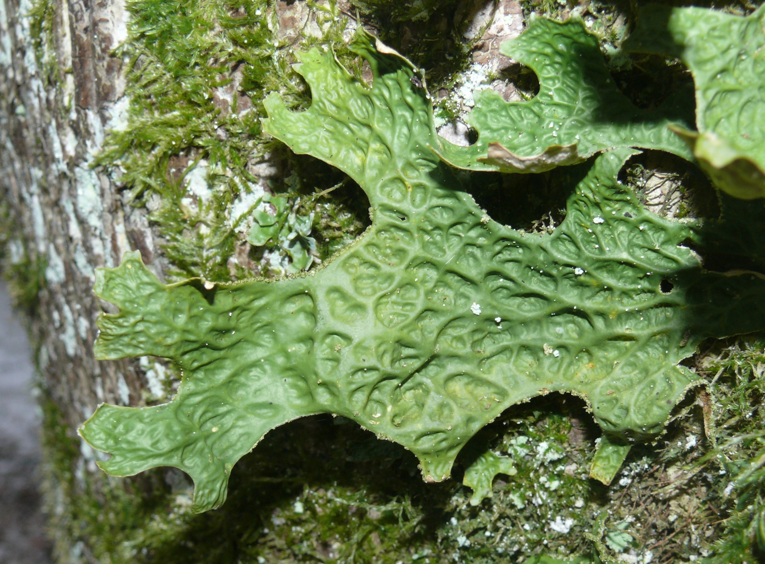 Lobaria pulmonaria, Schwäbisch-Fränkische Waldberge, Germany